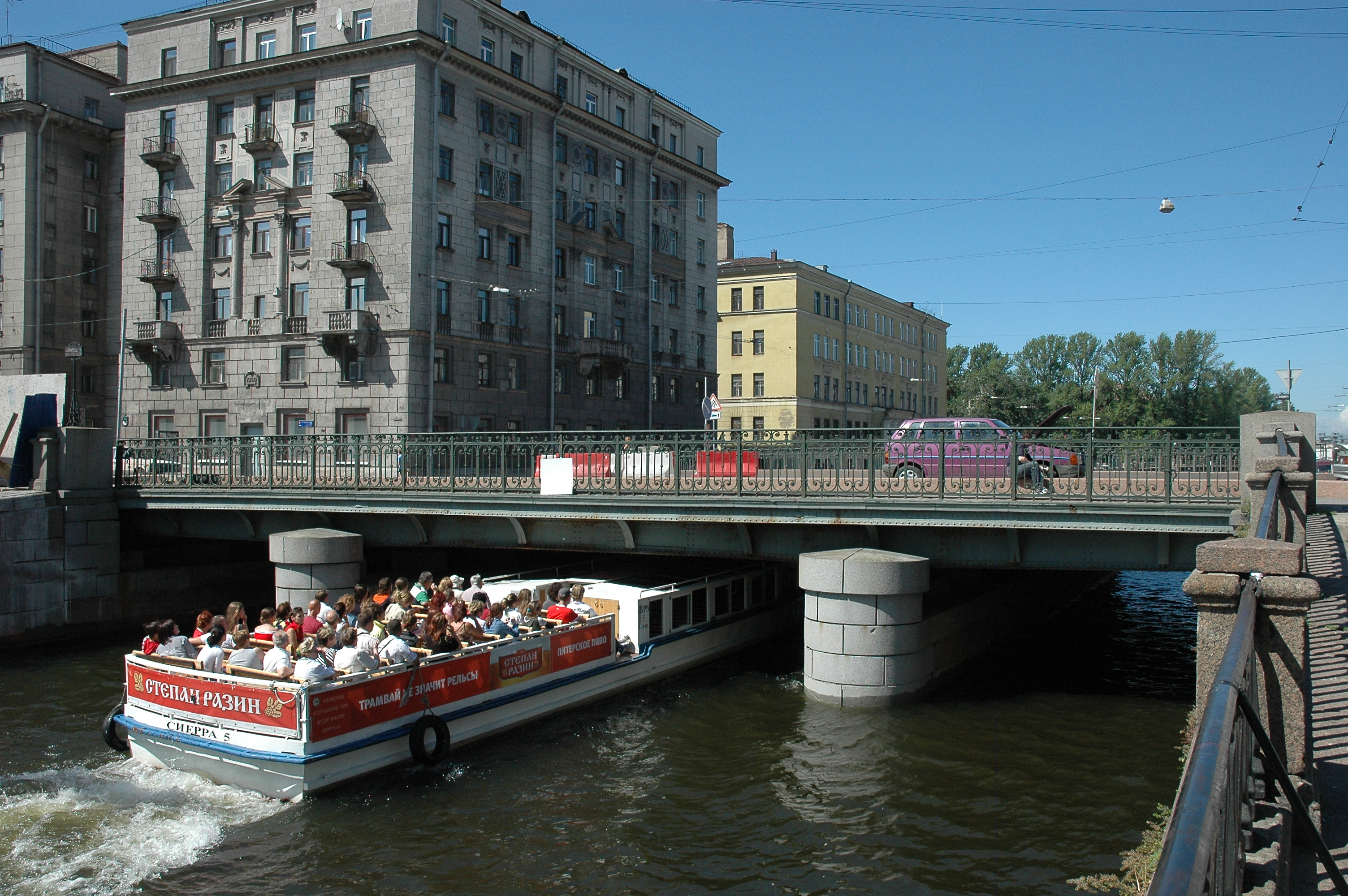 Dekabristov bridge across Kriukov canal (St Petersburg)